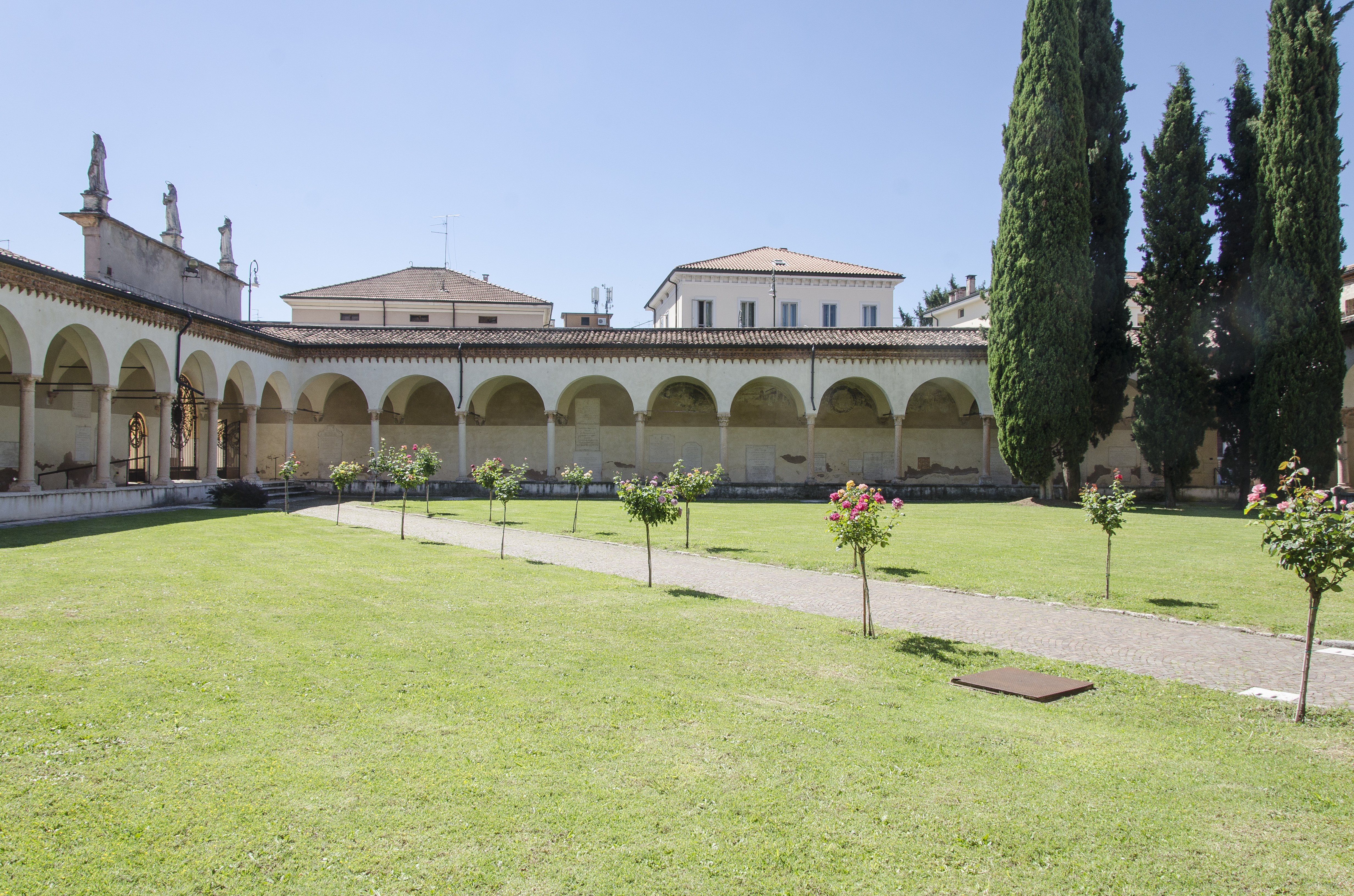 Chiesa di San Bernardino a Verona. Chiostro di Sant'Antonio